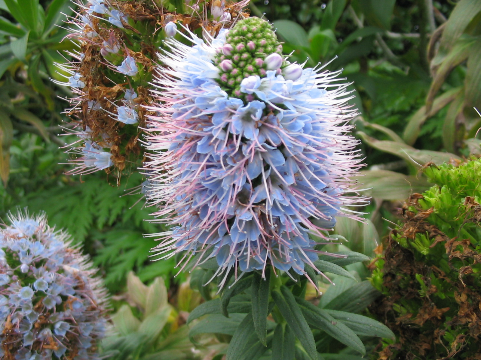 Prächtiger Natternkopf (Echium nervosum) - Flower